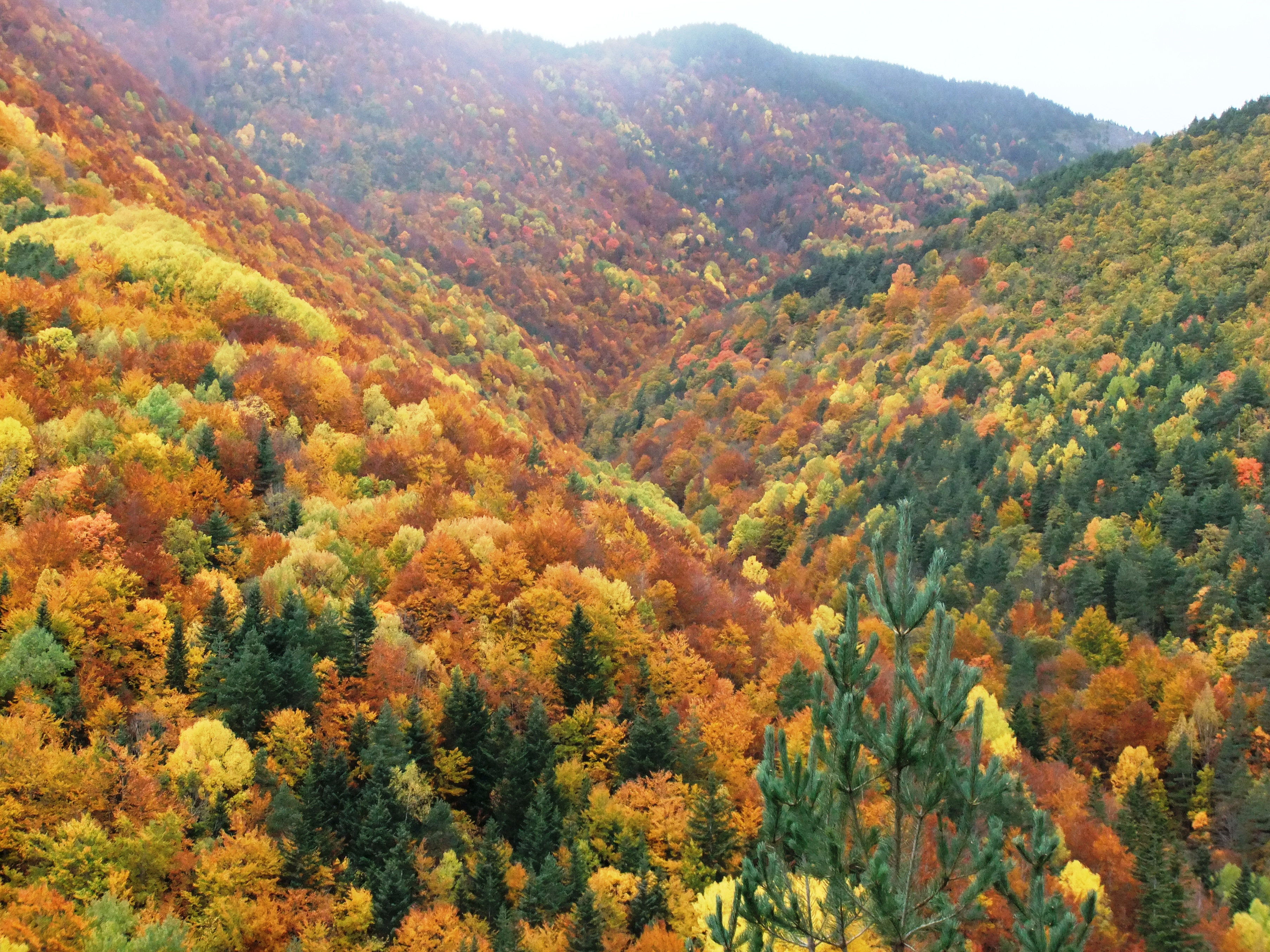 El mejor bosque de Europa en otoño: Bosque de la Pardina del Señor, entre Fanlo y Sarvisé, en el Pirineo de Aragón